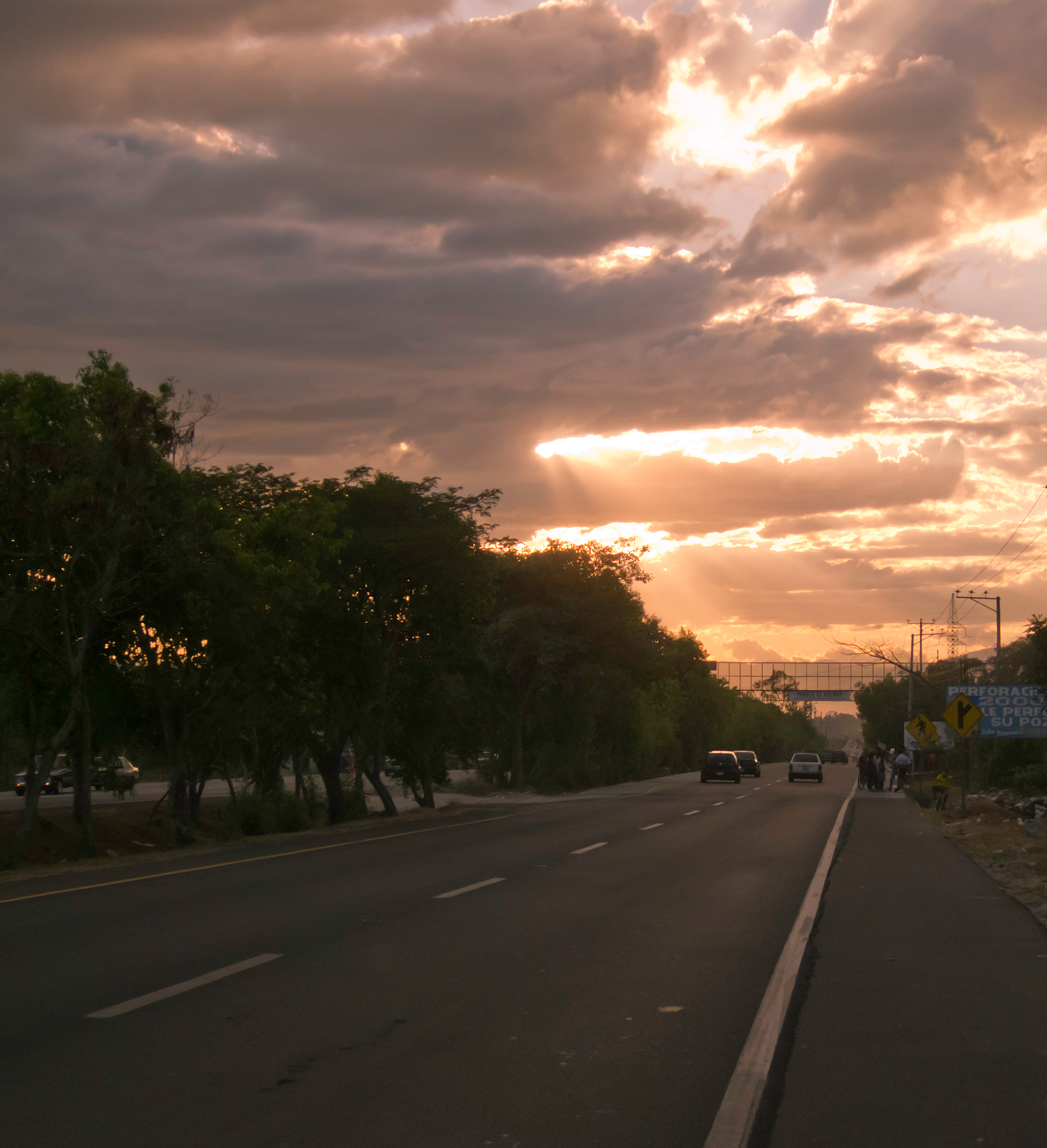 La Carretera Panamericana en El Salvador, mirando al oeste, antes de San Bartolo